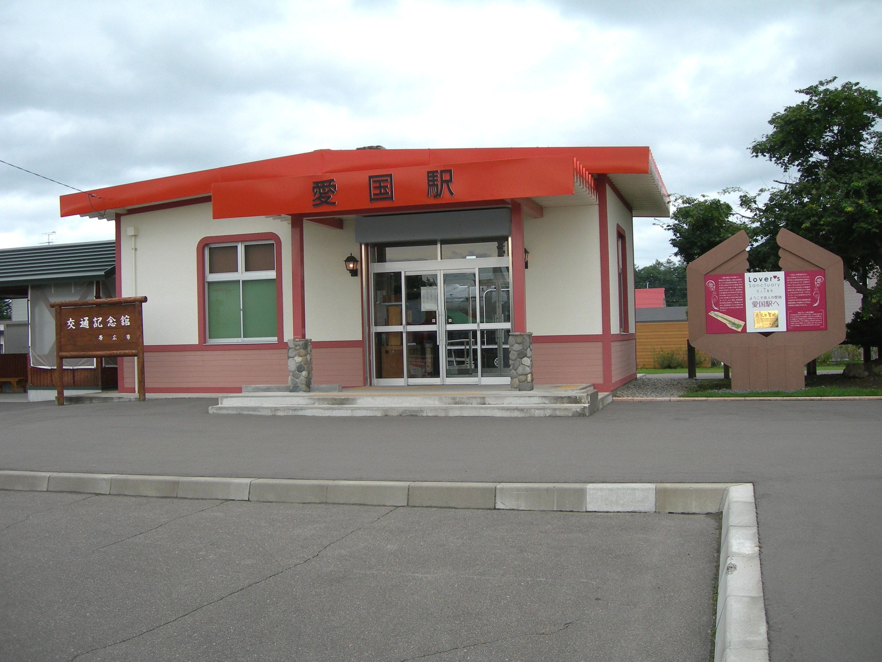 愛国駅